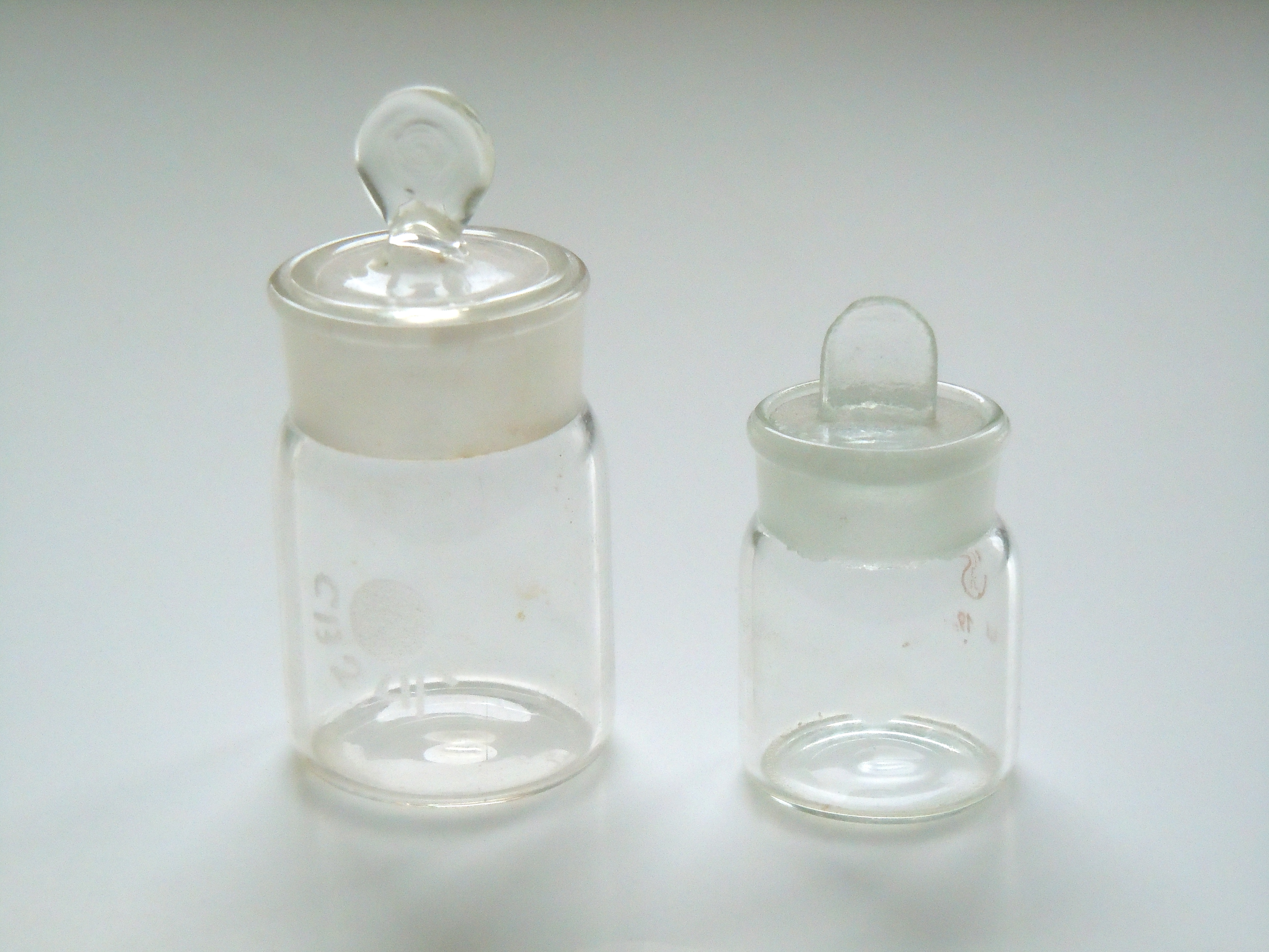 Бюксы